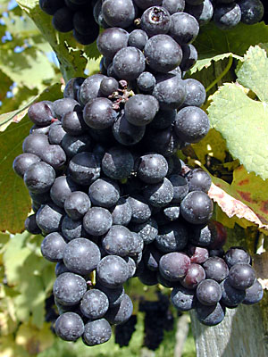 Blaue Burgunder Weintrauben (Spätburgunder Rotwein) (Original text: Blaue Burgunder Weintrauben (Spätburgunder Rotwein)) Fotograf: Alex Kamera: Nikon Coolpix 950 Software: GIMP Andere Versionen